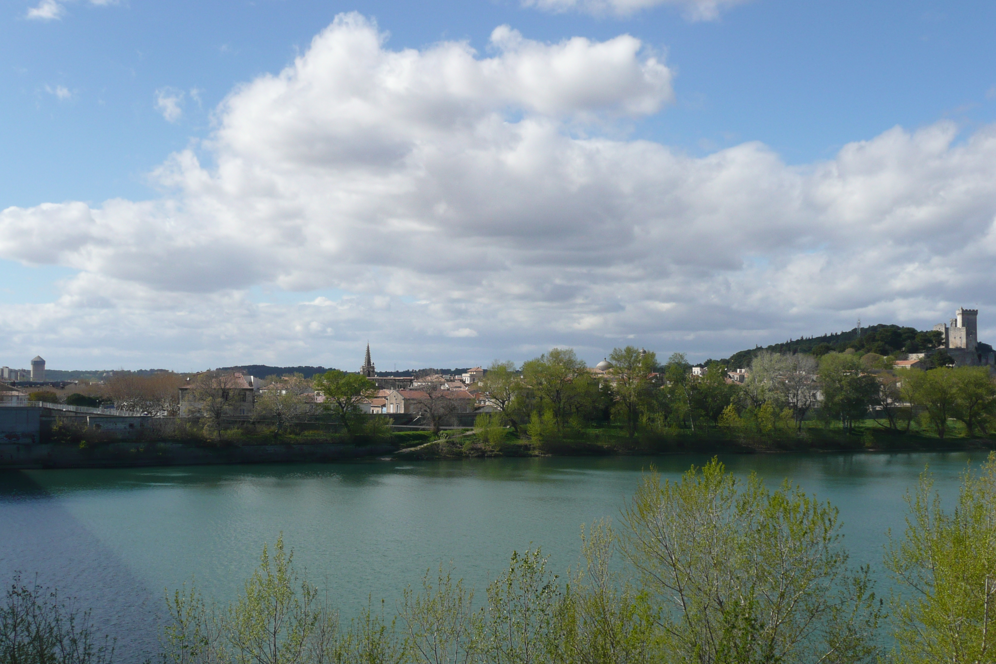 Vue sur Beaucaire depuis le milieu du Rhône (sur le pont).